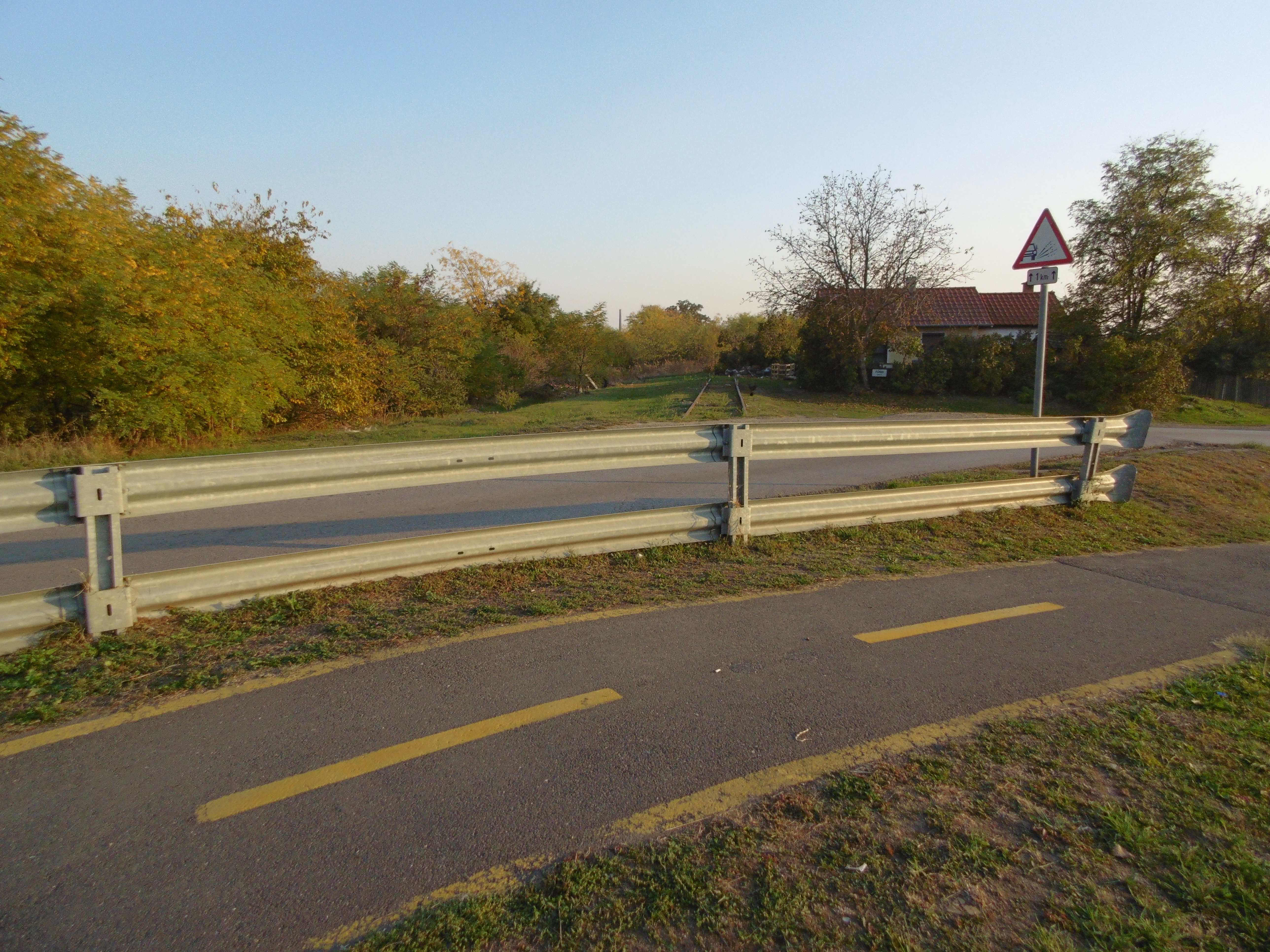 Az egykori újszentiváni vasúti átjáró és az egykori 320.sz. őrház (ma lakóépület).